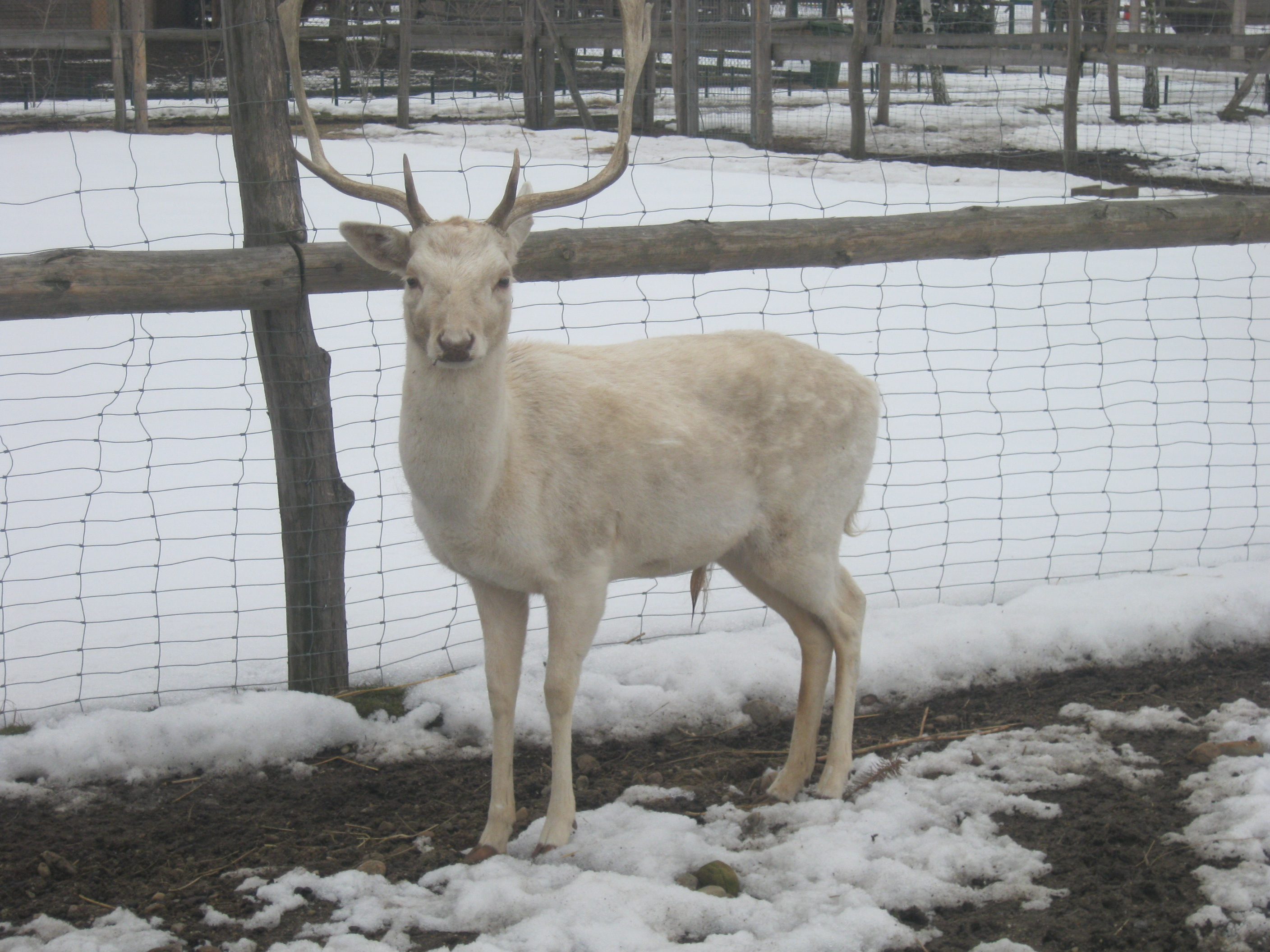 Danielius